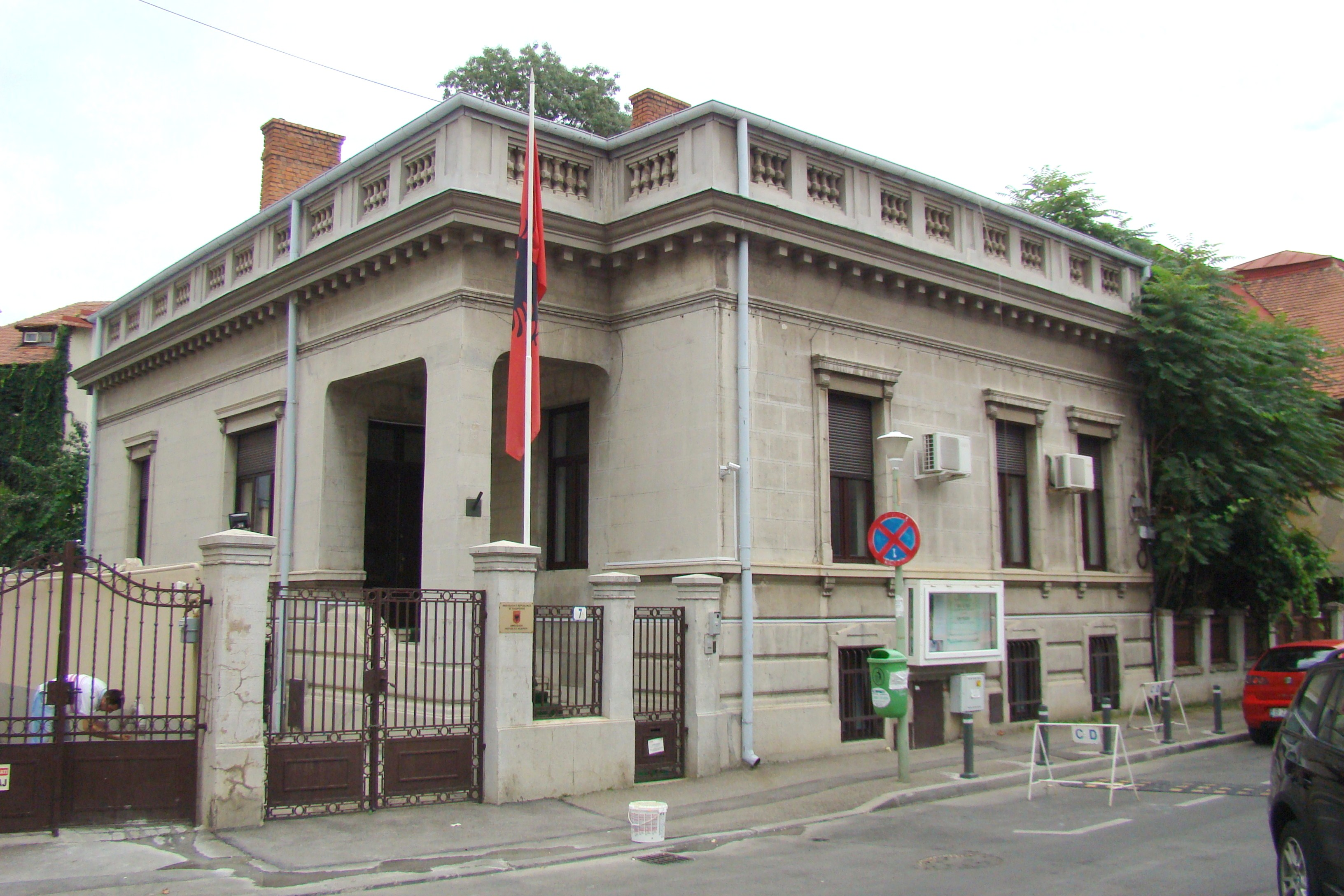 Clădire monument istoric, str. Duiliu Zamfirescu, nr.7